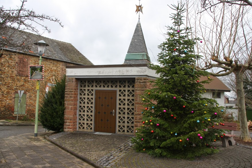 Donatus-Kepelle in Straß